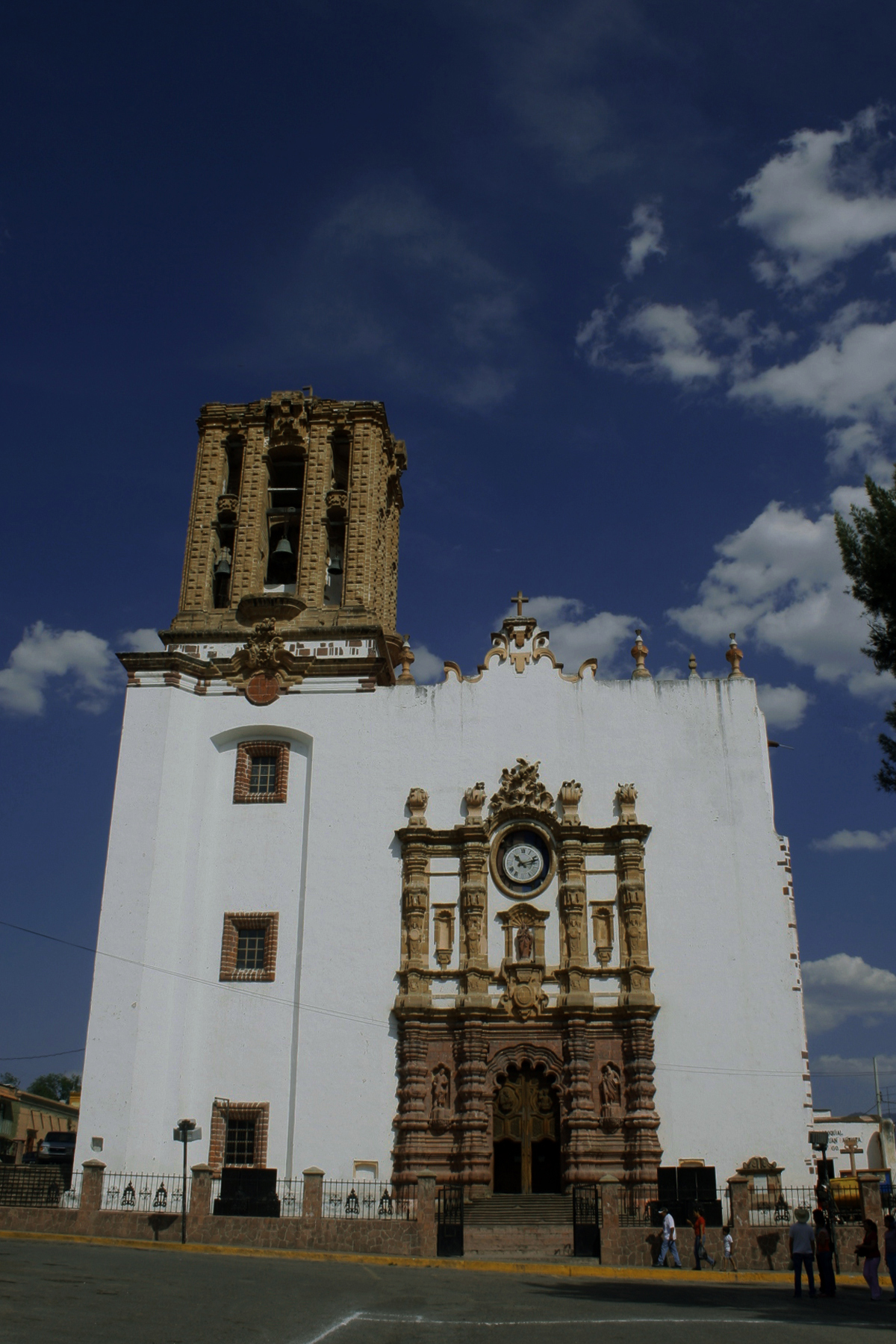 FACHADA IGLESIA DE ZIMAPAN